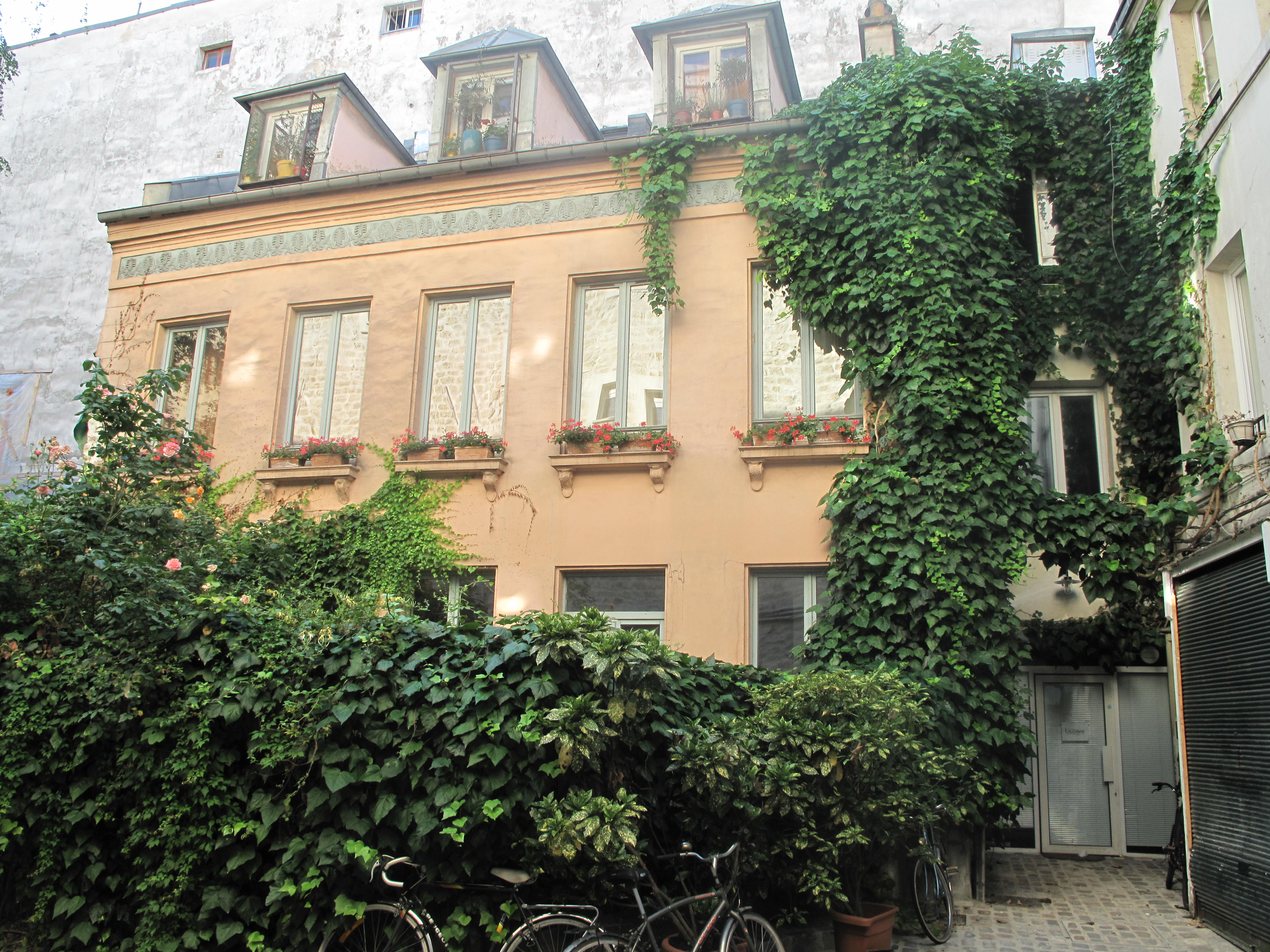 Cour de l'Étoile d'Or, rue de faubourg Saint-Antoine, Paris 11e arr.